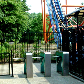 Tourniquet